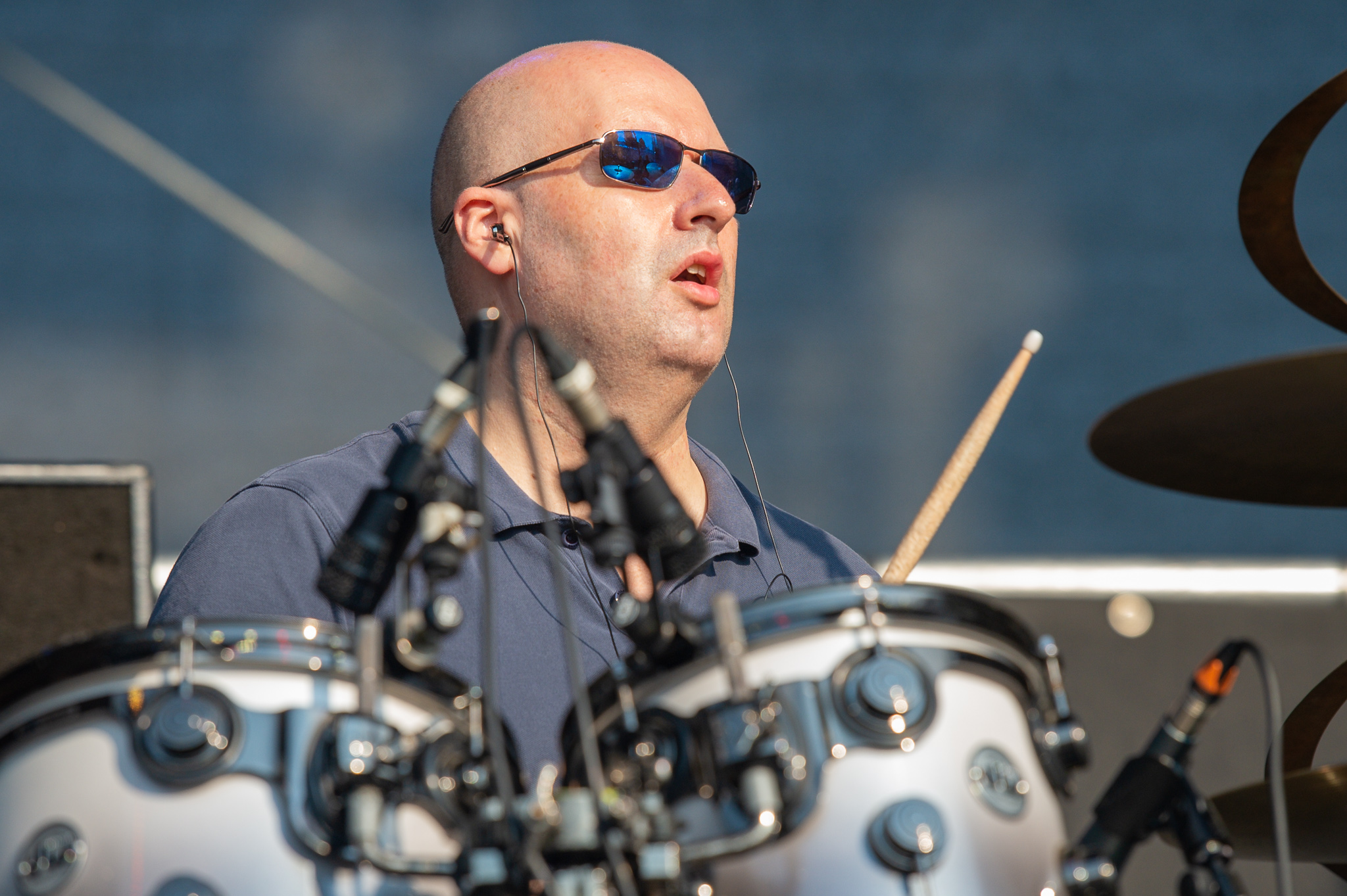 Andreas Keller,Brombachsee,Concertbüro Franken,Festival,Konzert,Lieder am See,Livekonzert,Livemusik,Musik,Spider Murphy Gang